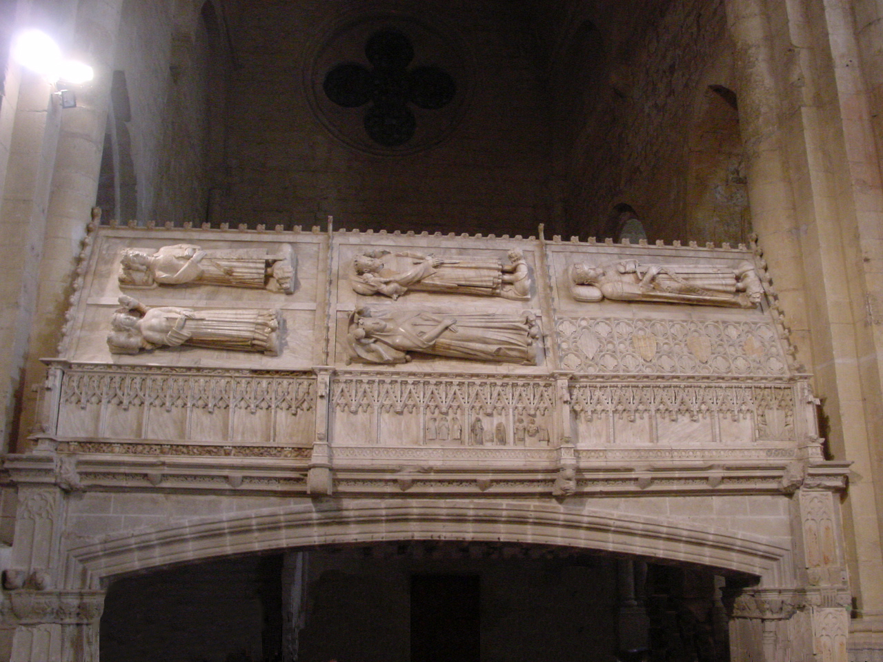 Panteó Reial, monastir de Poblet; restauració Frederic Marès. Panteón Real, monasterio de Poblet; restauración de Frederic Marès. Royal pantheon, Poblet monastery. Restoration by Frederic Marès.